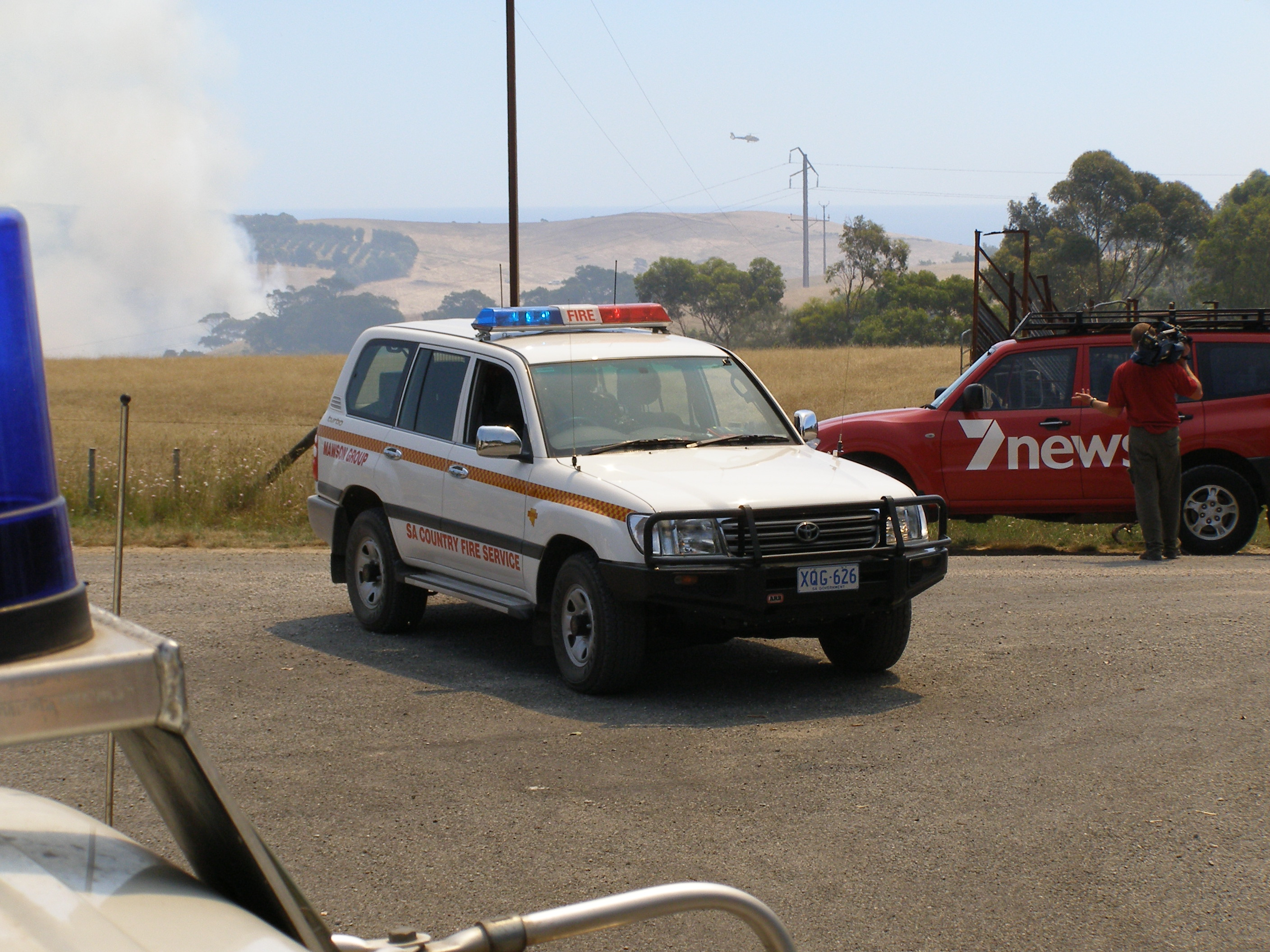 taken by user:emmanuellives taken by user:emmanuellives